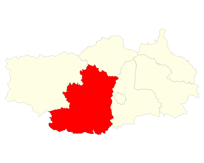 Localisation du district de Betafo dans la région Vakinankaratra